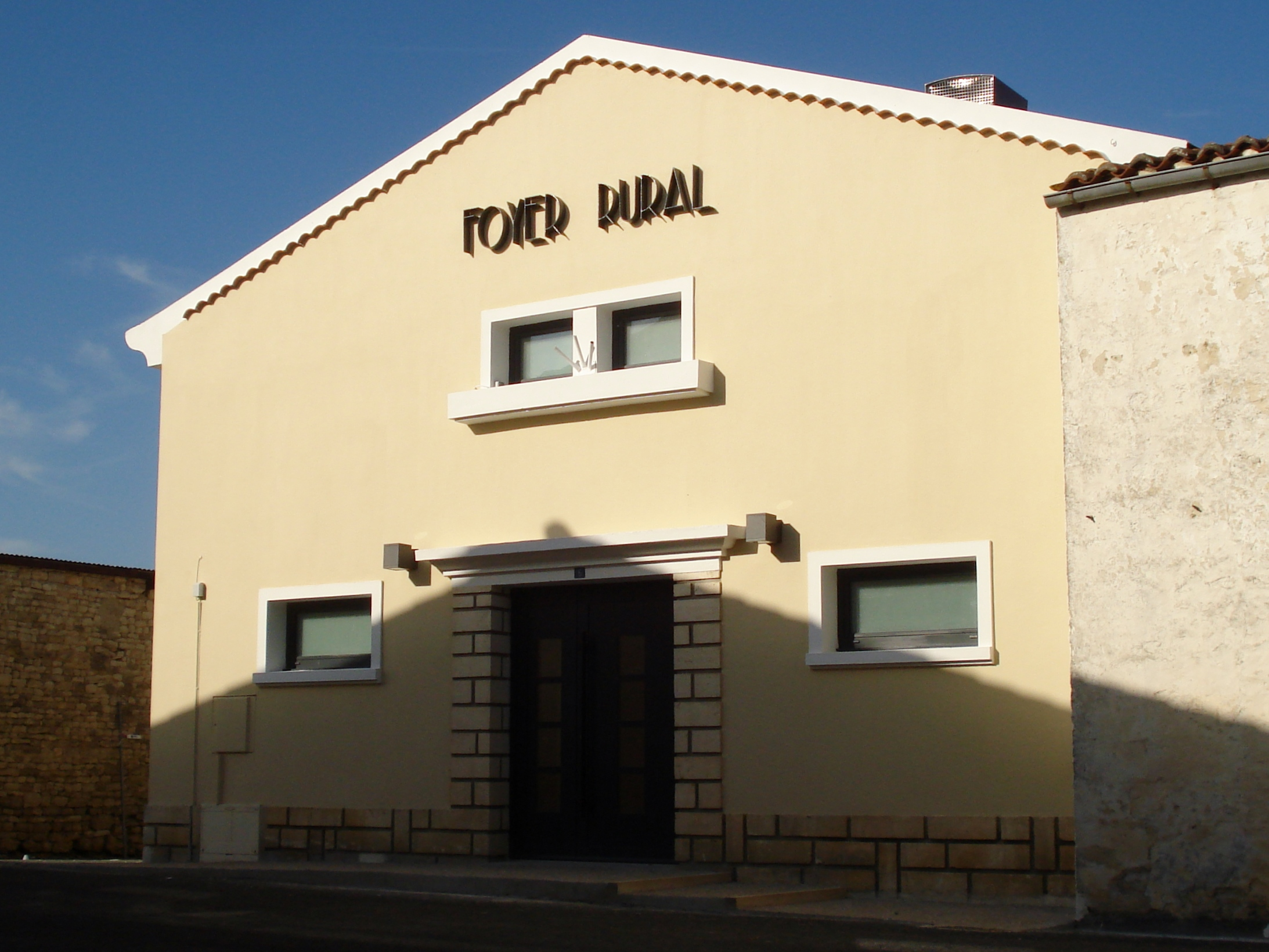 Foyer rural du Gicq en Charente-Maritime